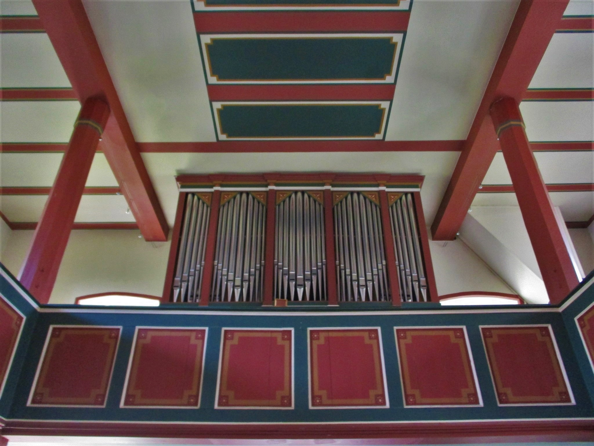 Auferstehungskirche Frankfurt am Main-Praunheim, Schuke-Orgel